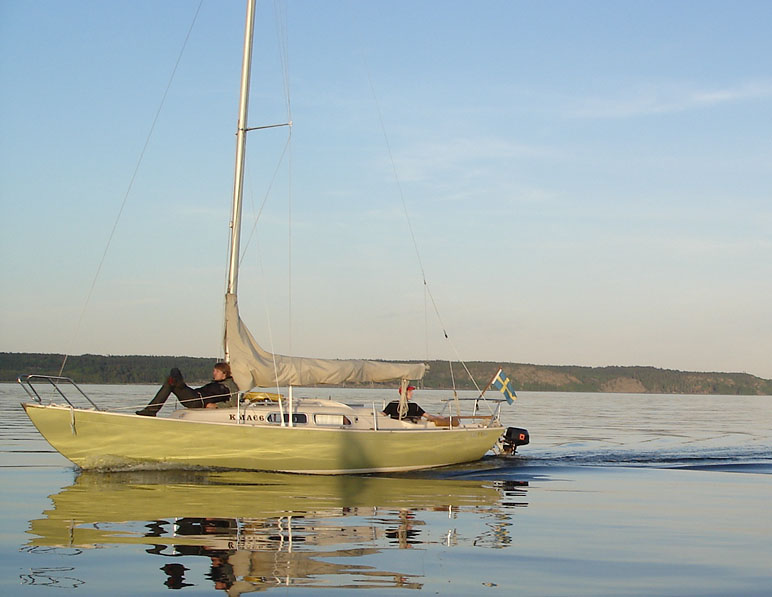 If båt